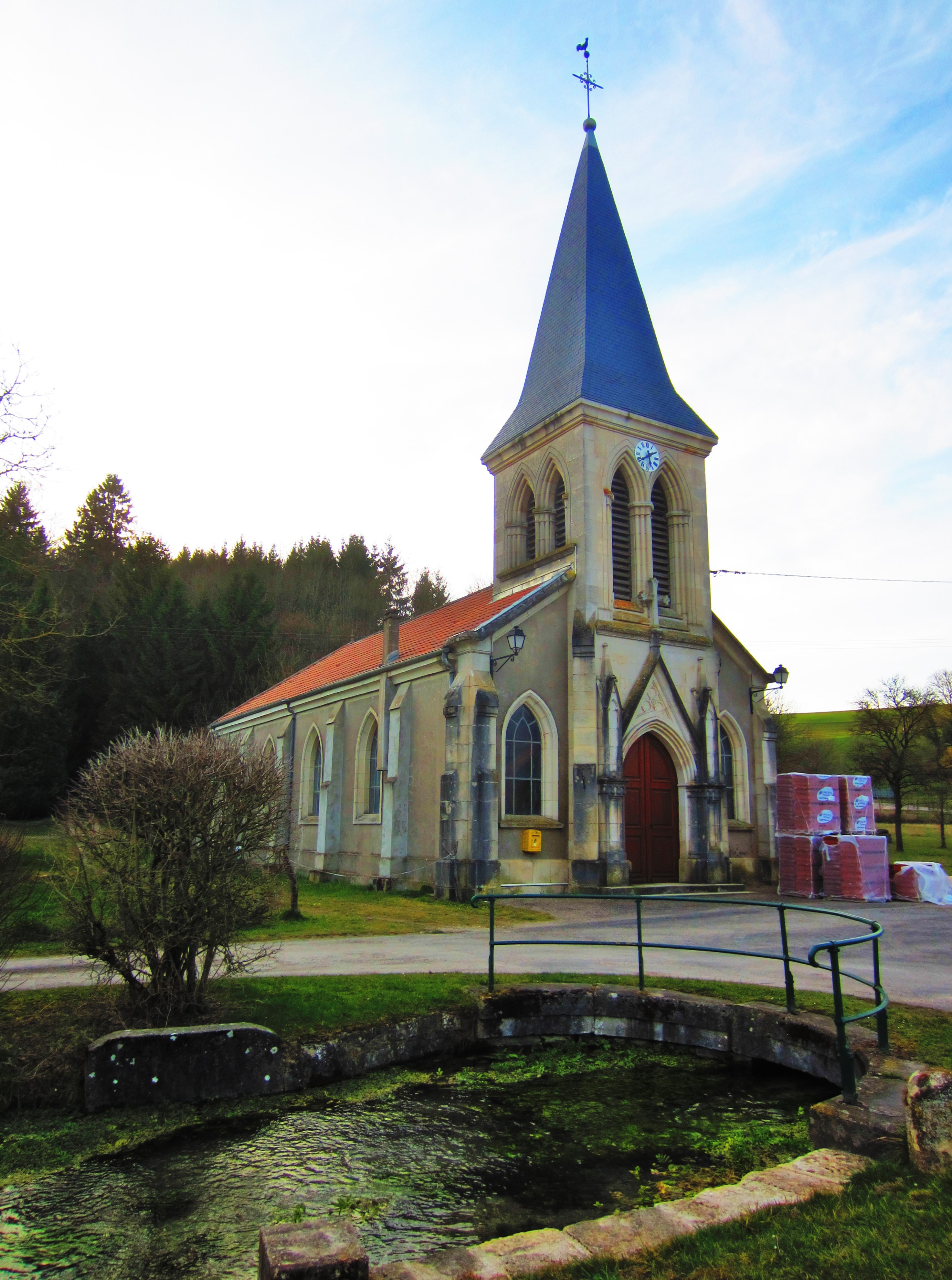 Deuxnouds Bois eglise